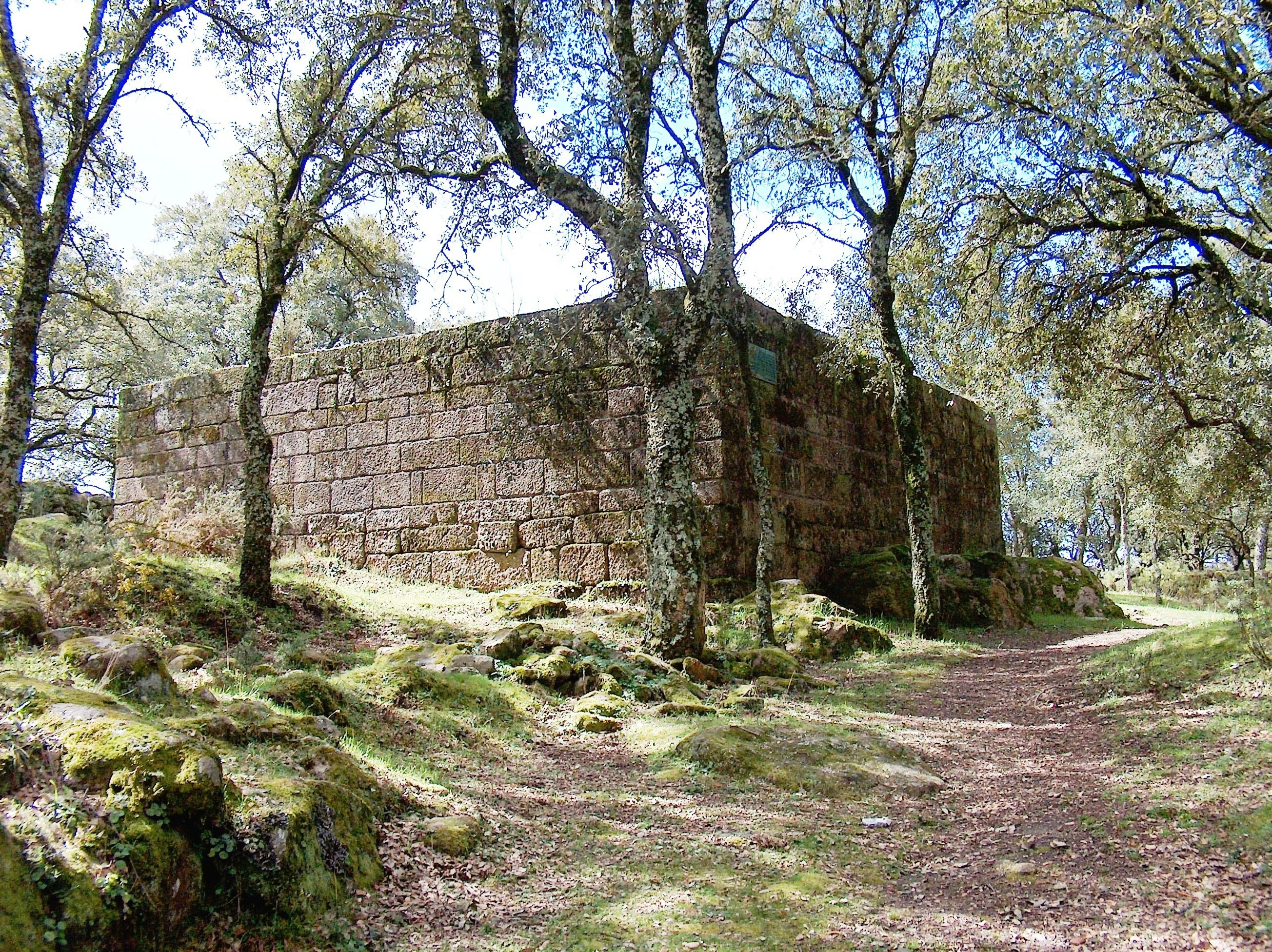 Castelo de Faria. no concelho de Barcelos, distrito de Braga, Portugal.